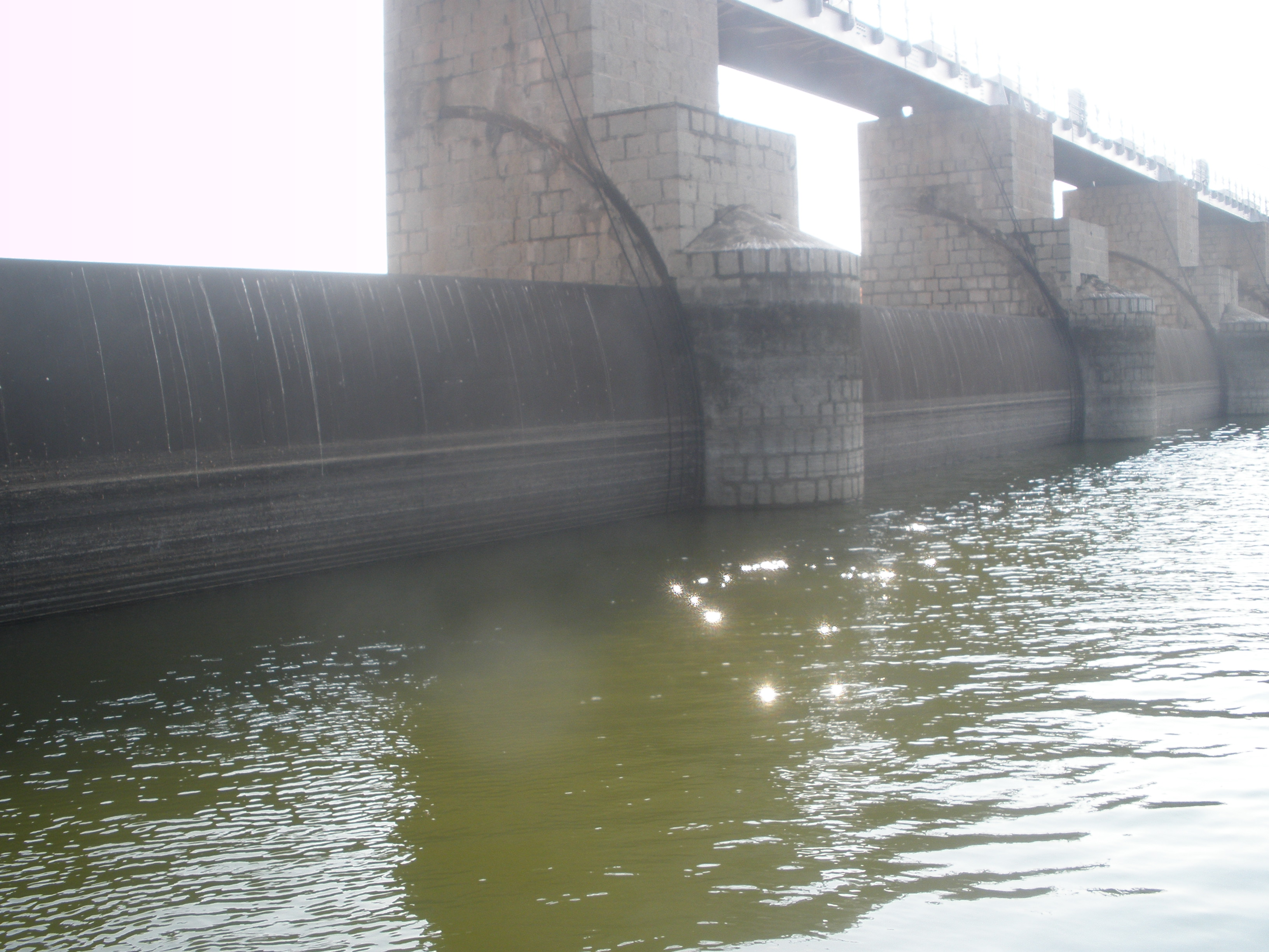 Pambar Dam